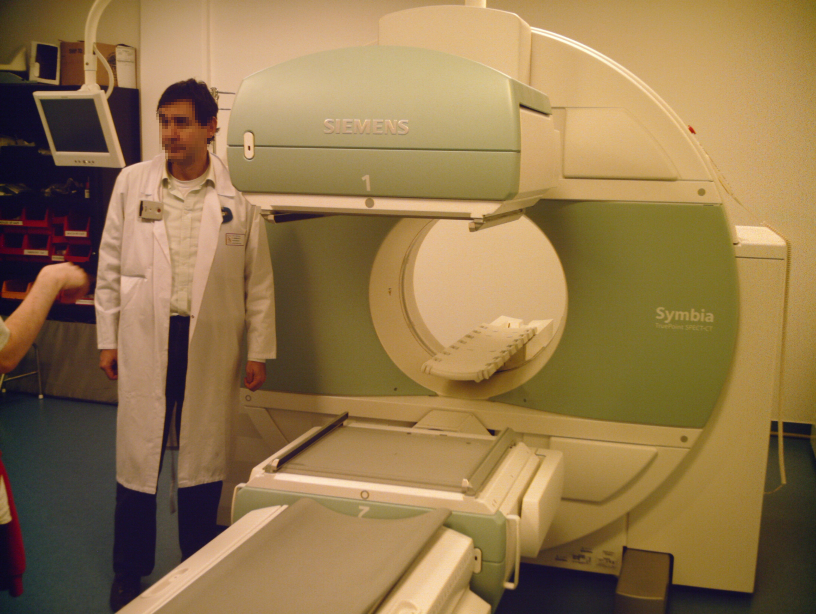 Tomographe d'émission monophotonique de marque Siemens. Il est composé de deux gamma-caméras.